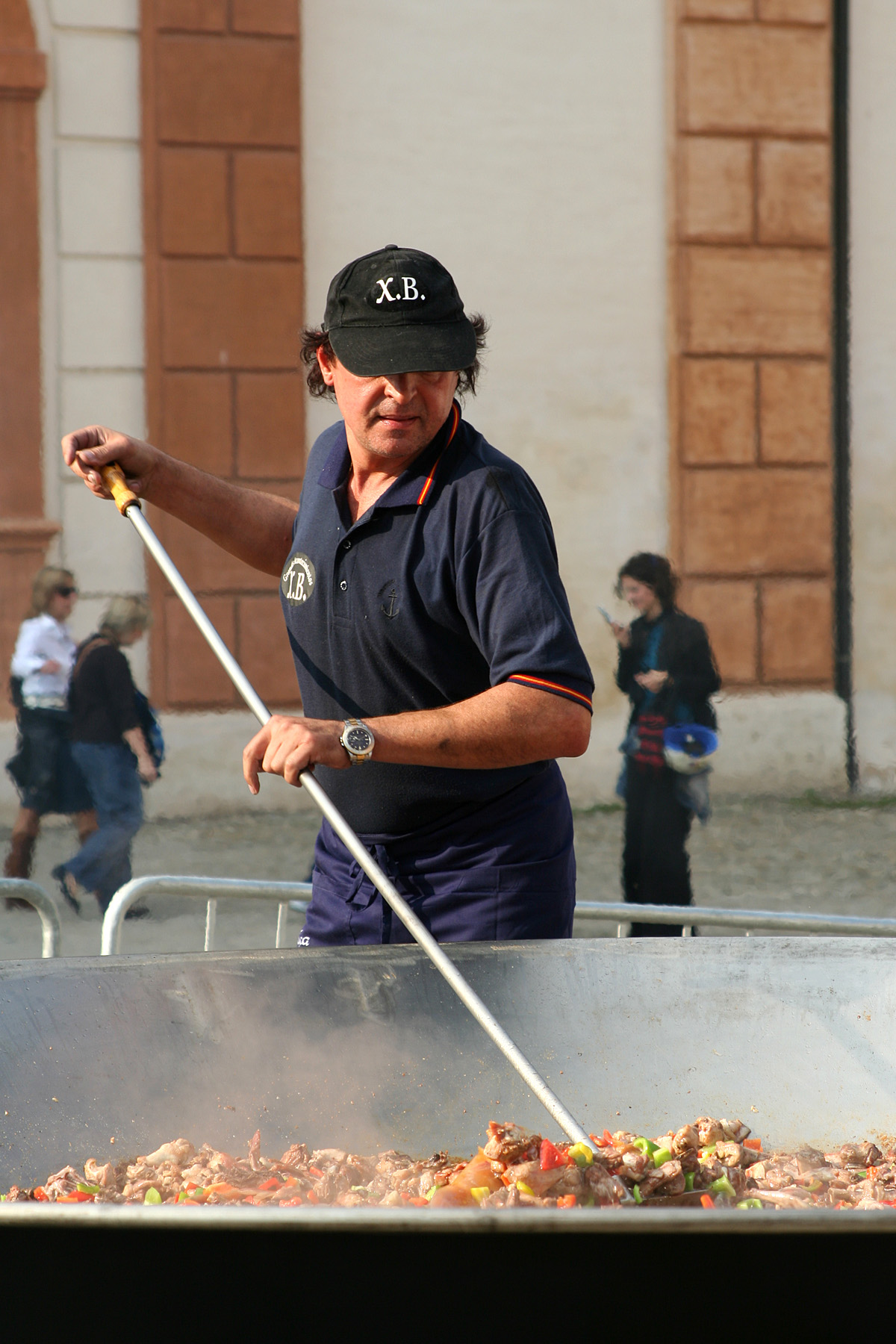 Paella